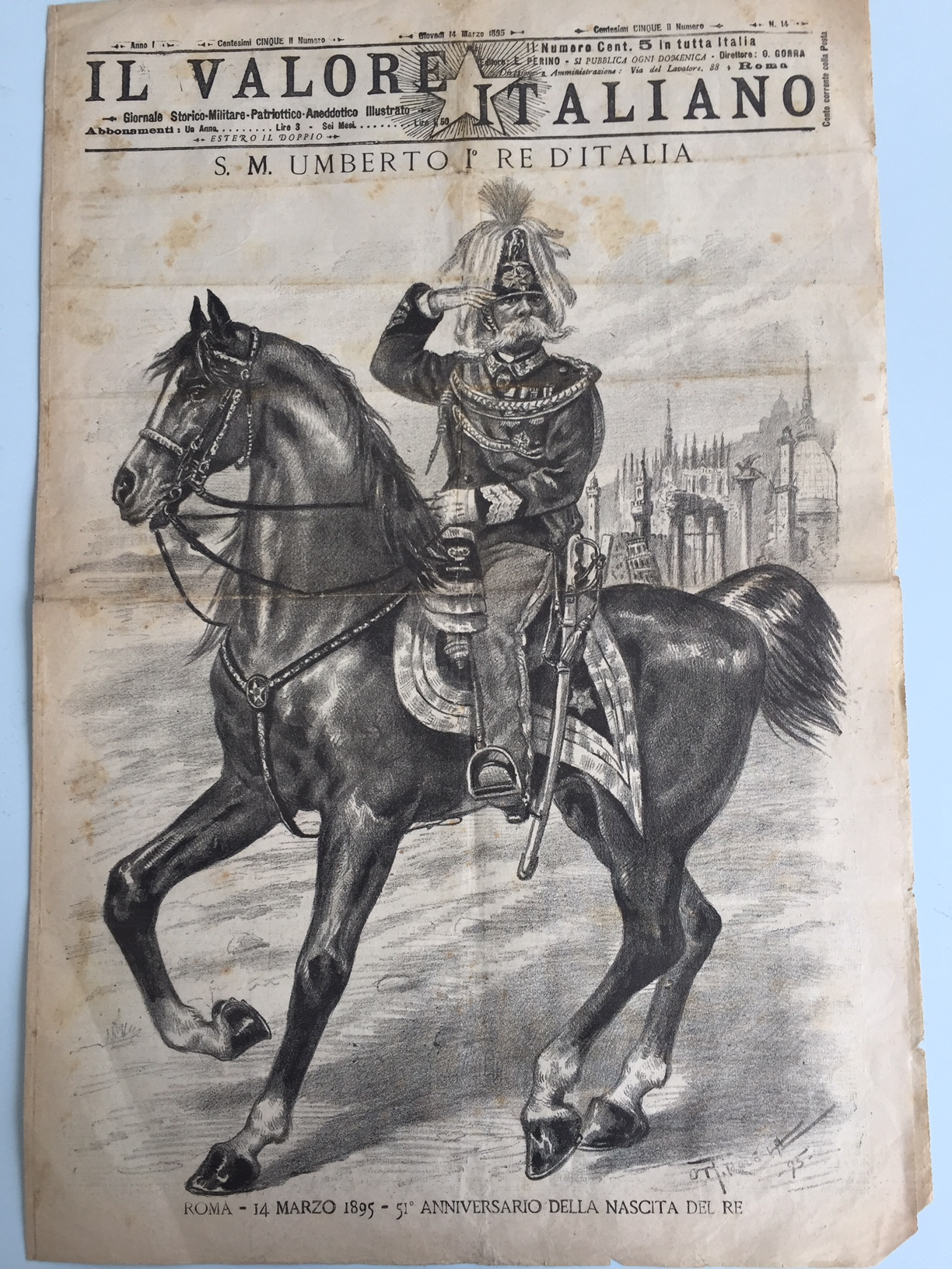 La prima pagina rappresenta Umberto I Re d'Italia, a cavallo in alta uniforme, in occasione del suo cinquantunesimo compleanno.